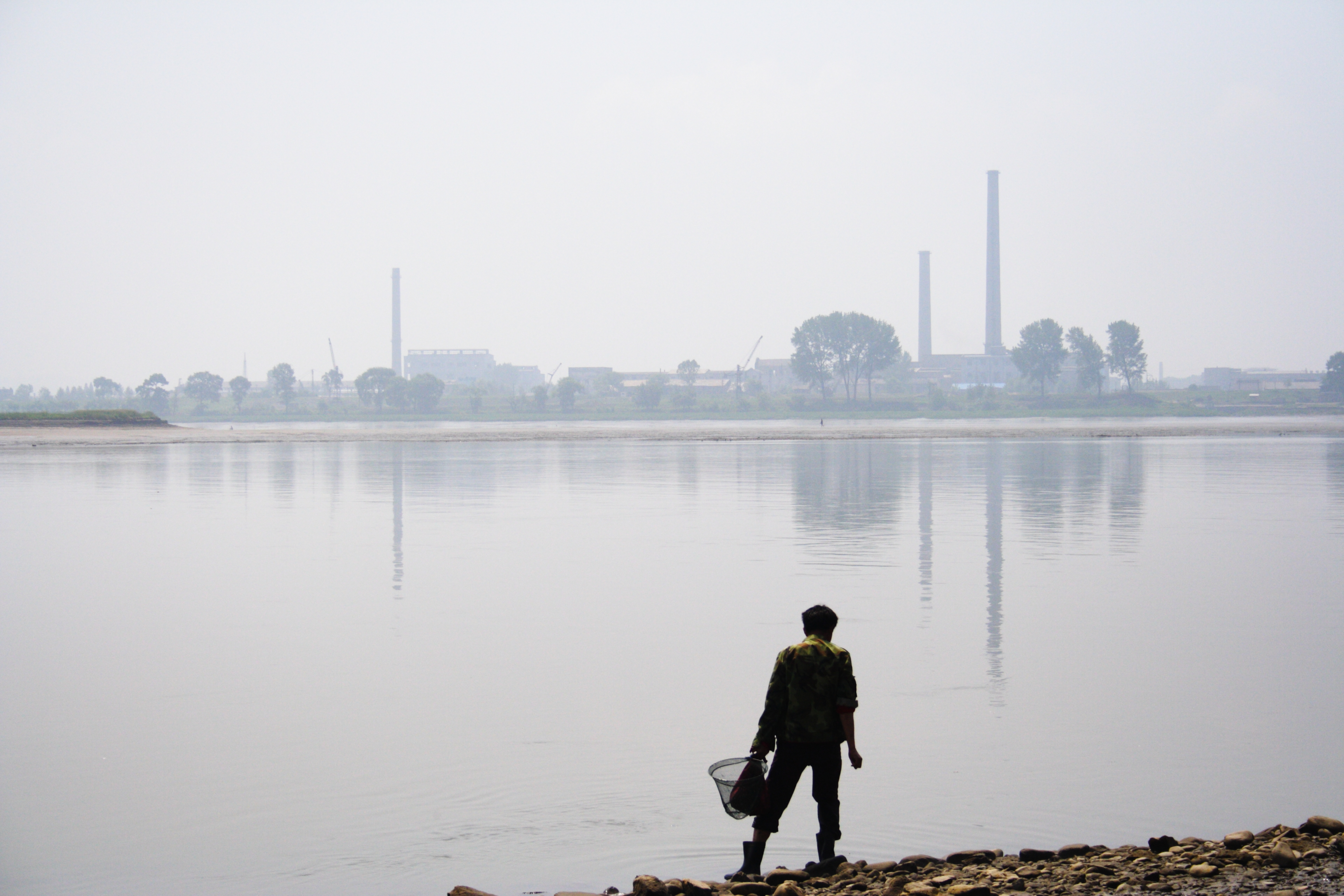 Un pescatore cinese cerca molluschi sulla riva del fiume Yalu. Sullo sfondo, la fabbrica sul lato nordcoreano. Dandong China, 2009-06-15